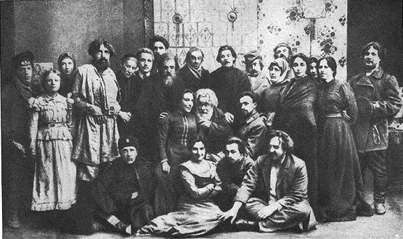 А. М. Горький среди исполнителей пьесы «Мещане» в Художественном театре. 1902 г.